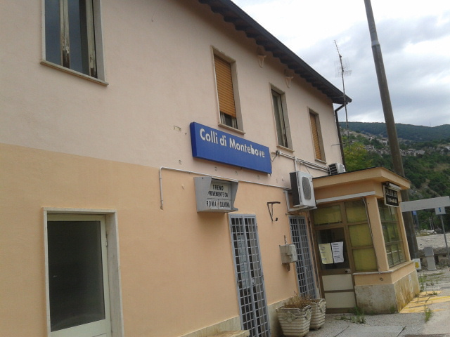 Stazione di Colli di Montebove